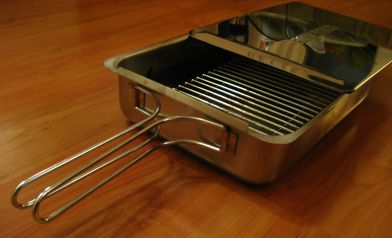 Eigen gemaakte foto